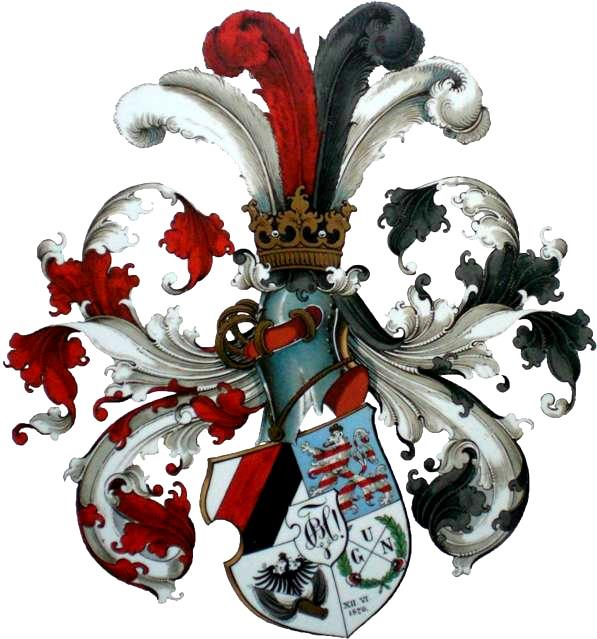 Studentenwappen des Corps Hasso-Borussia Freiburg